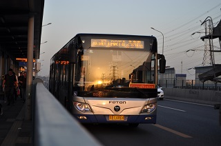 中文（中国大陆）: 快速公交四号线的高架桥站